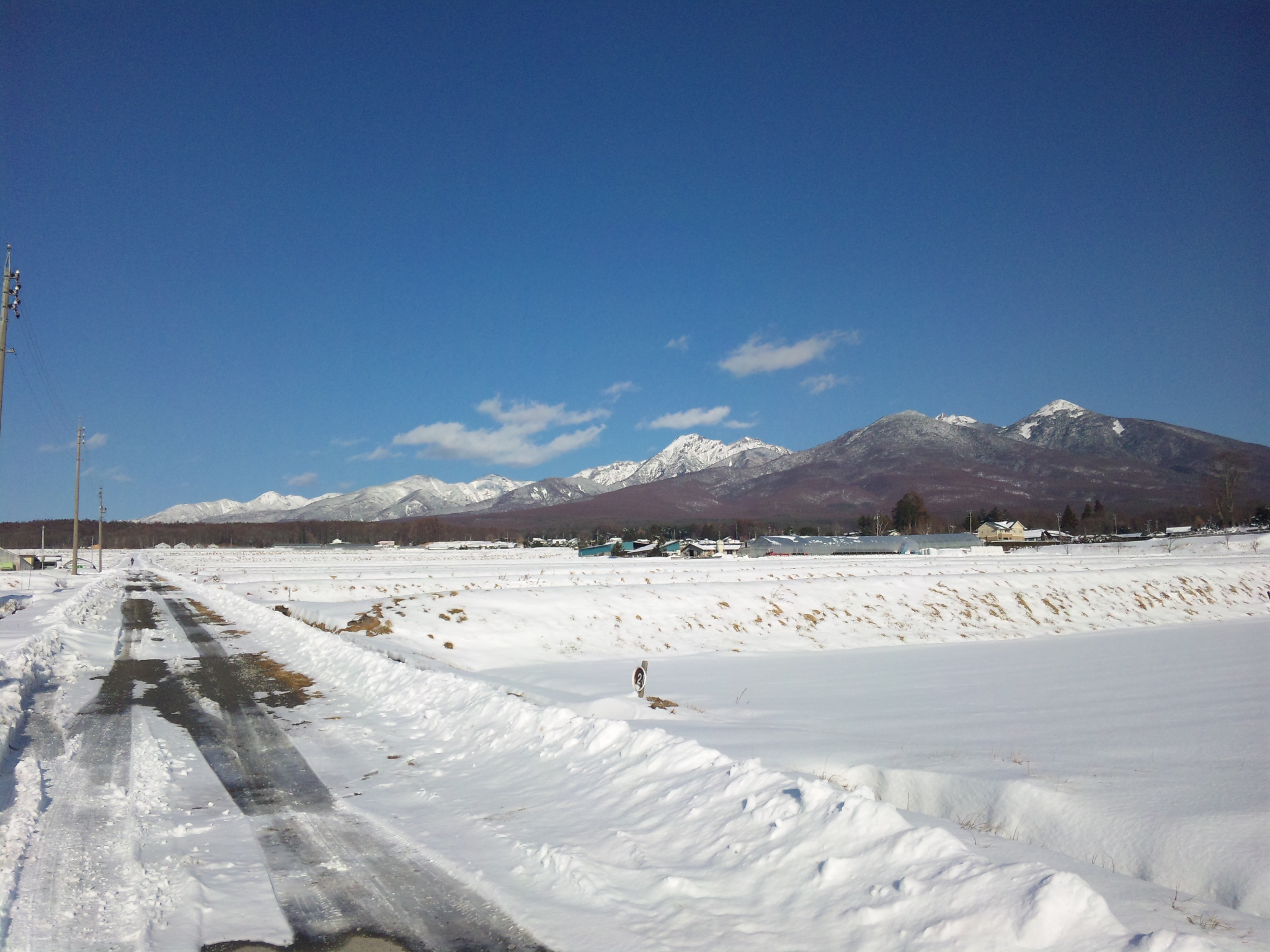 八ヶ岳の冬